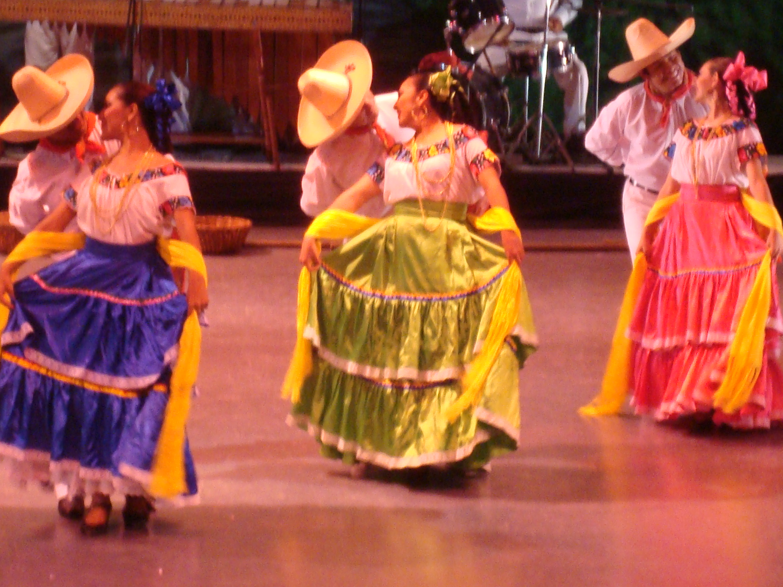 Bailarines de "Zapateo tabasqueño", el baile regional del estado de Tabasco, México.